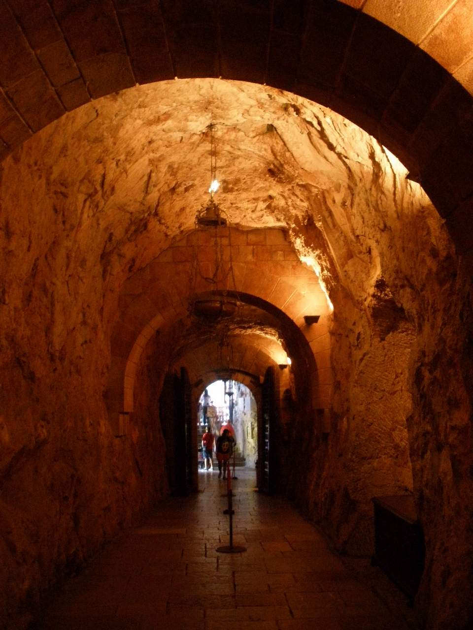 Covadonga - Santa Cueva